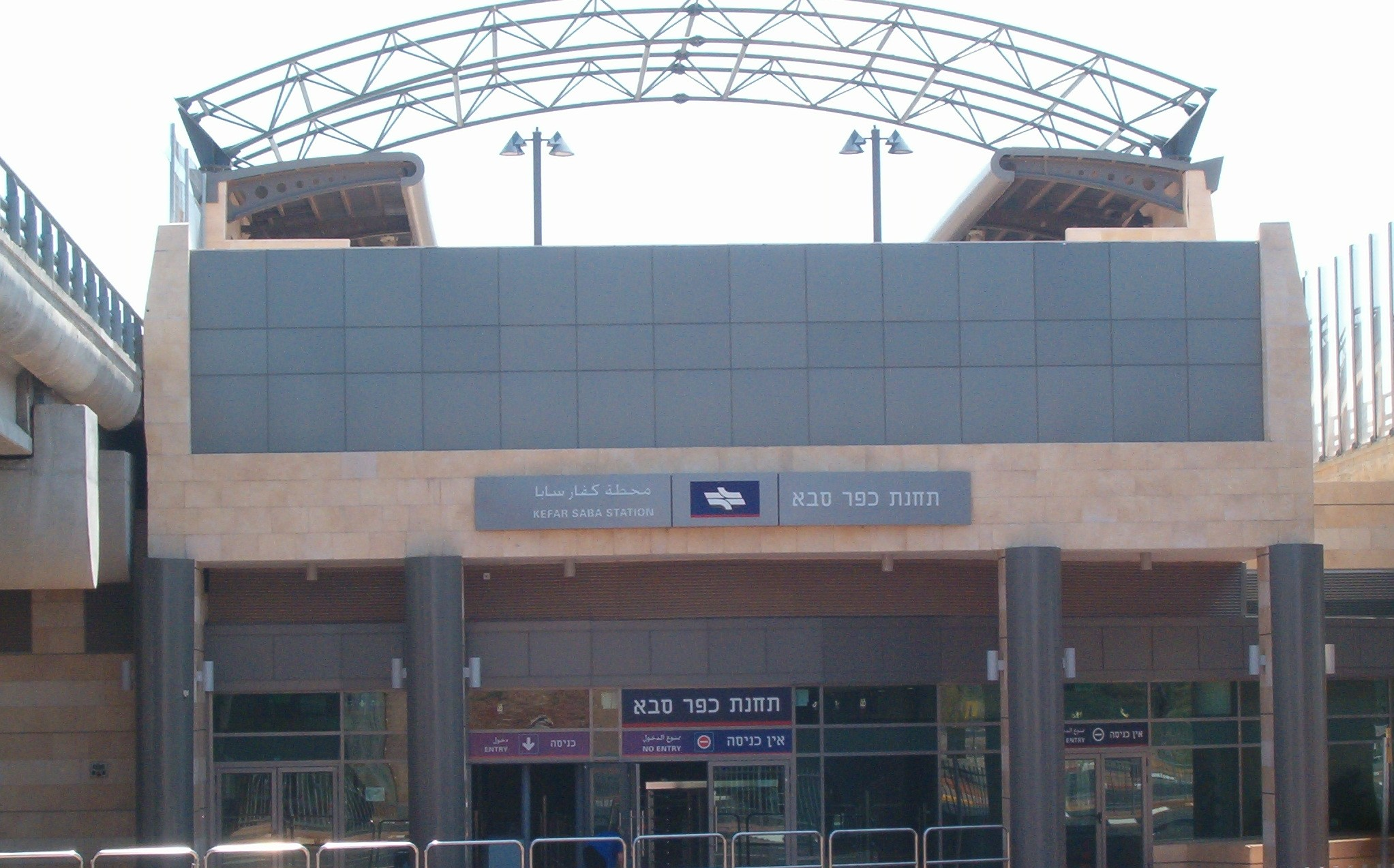 תחנת רכבת כפר סבא